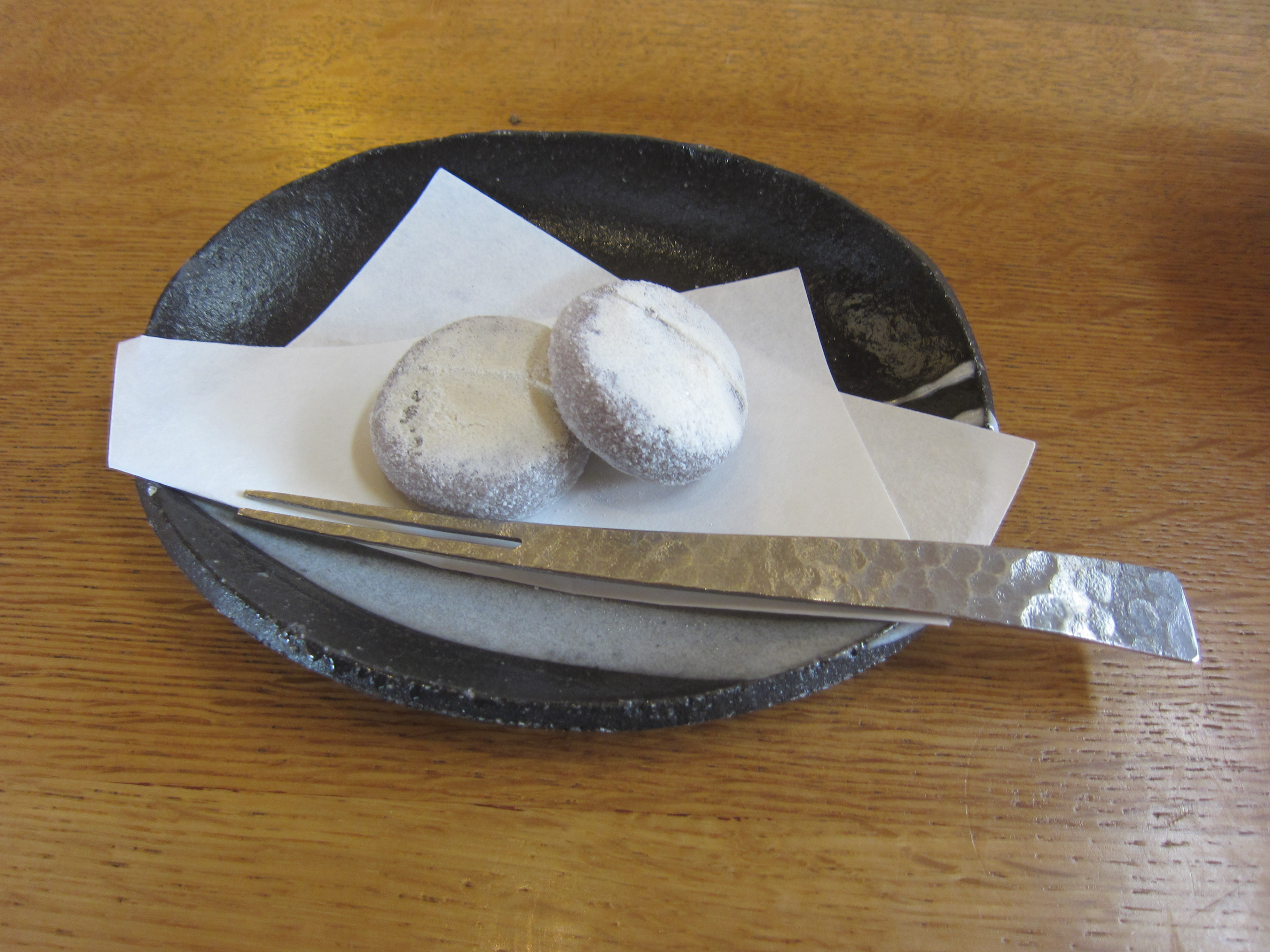 伊勢地方関宿の銘菓（和菓子）『関の戸』